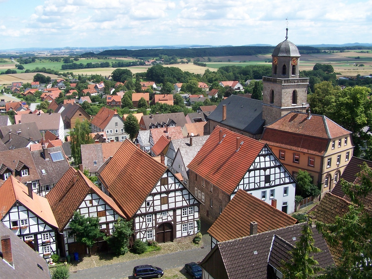 Rhoden (Diemelstadt), Blick vom Schloss über die Altstadt